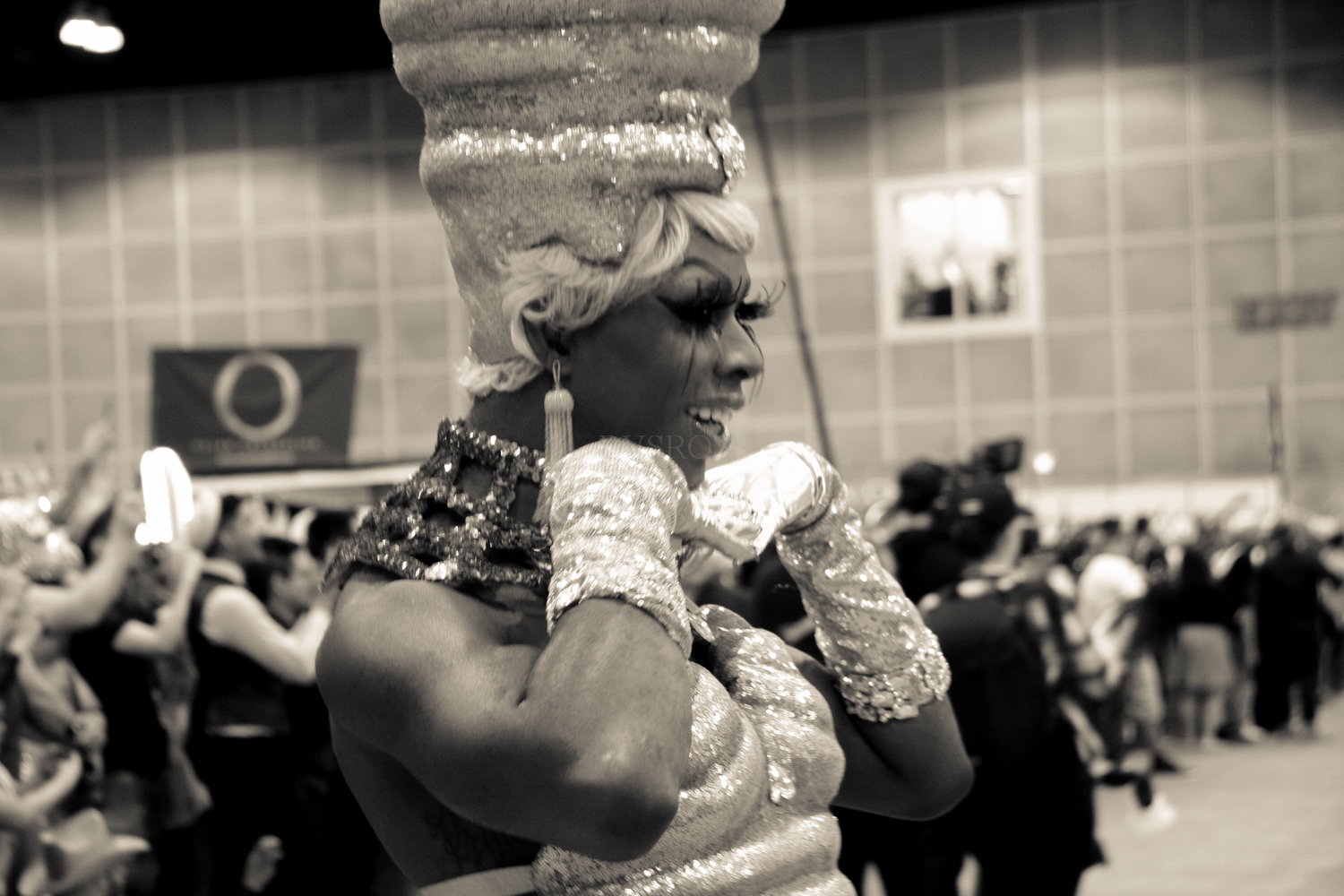 Rupaul DragCon 2019 - Los Angeles